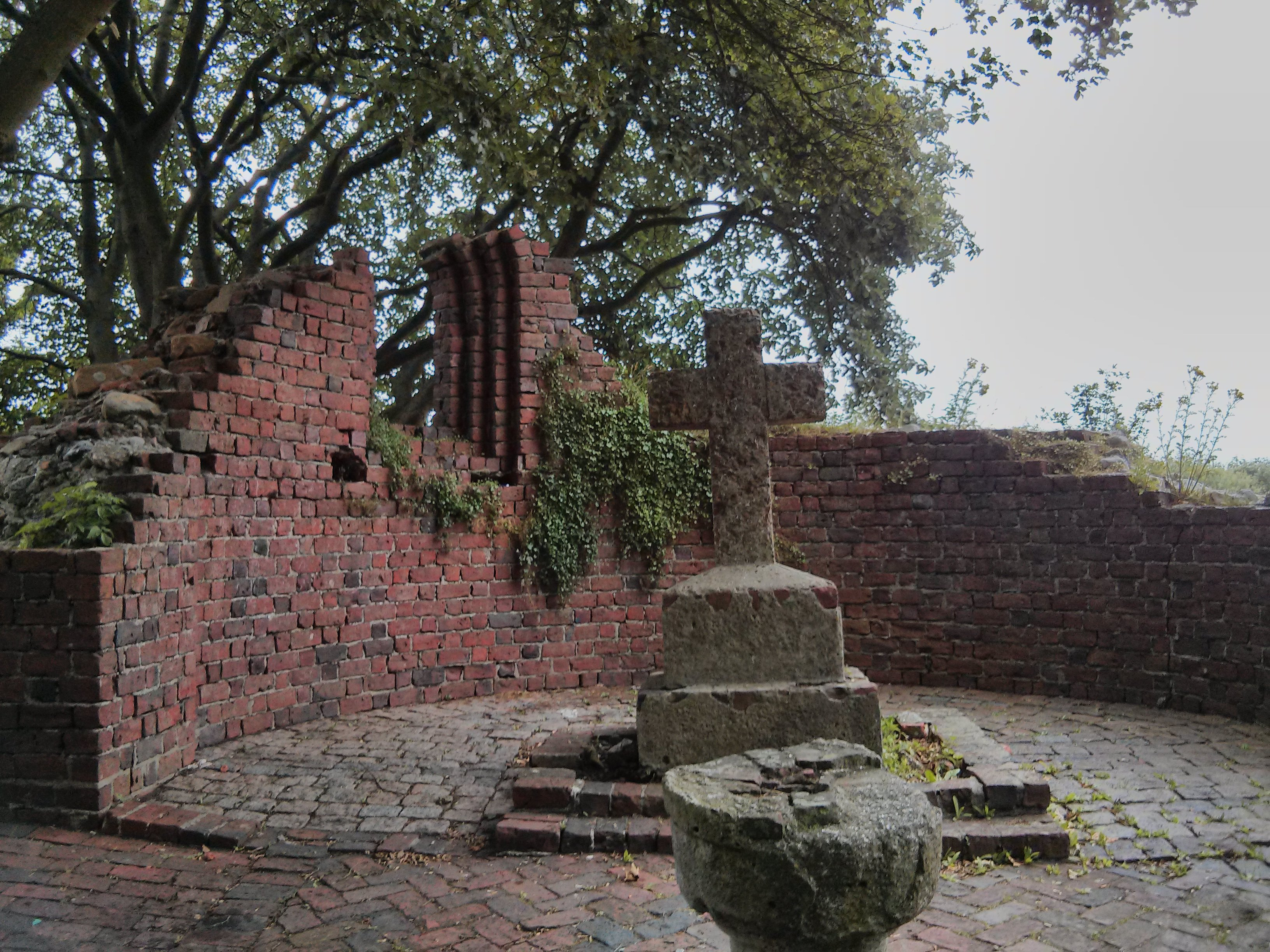 Die Banter Ruine in Wilhelmshaven, aufgenommen am 13. Juli 2015.